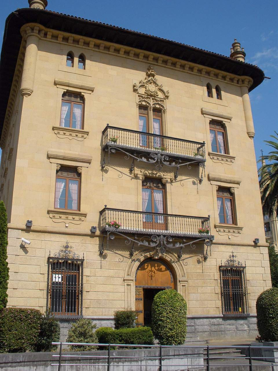 Palacio Olaso, en Trapagaran (Bizkaia)